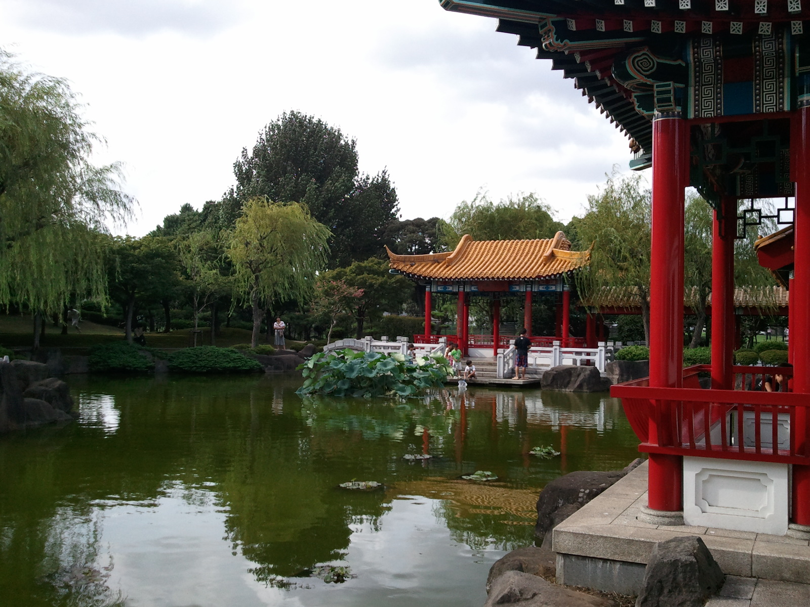 瀋秀園（神奈川県川崎市川崎区大師公園内）